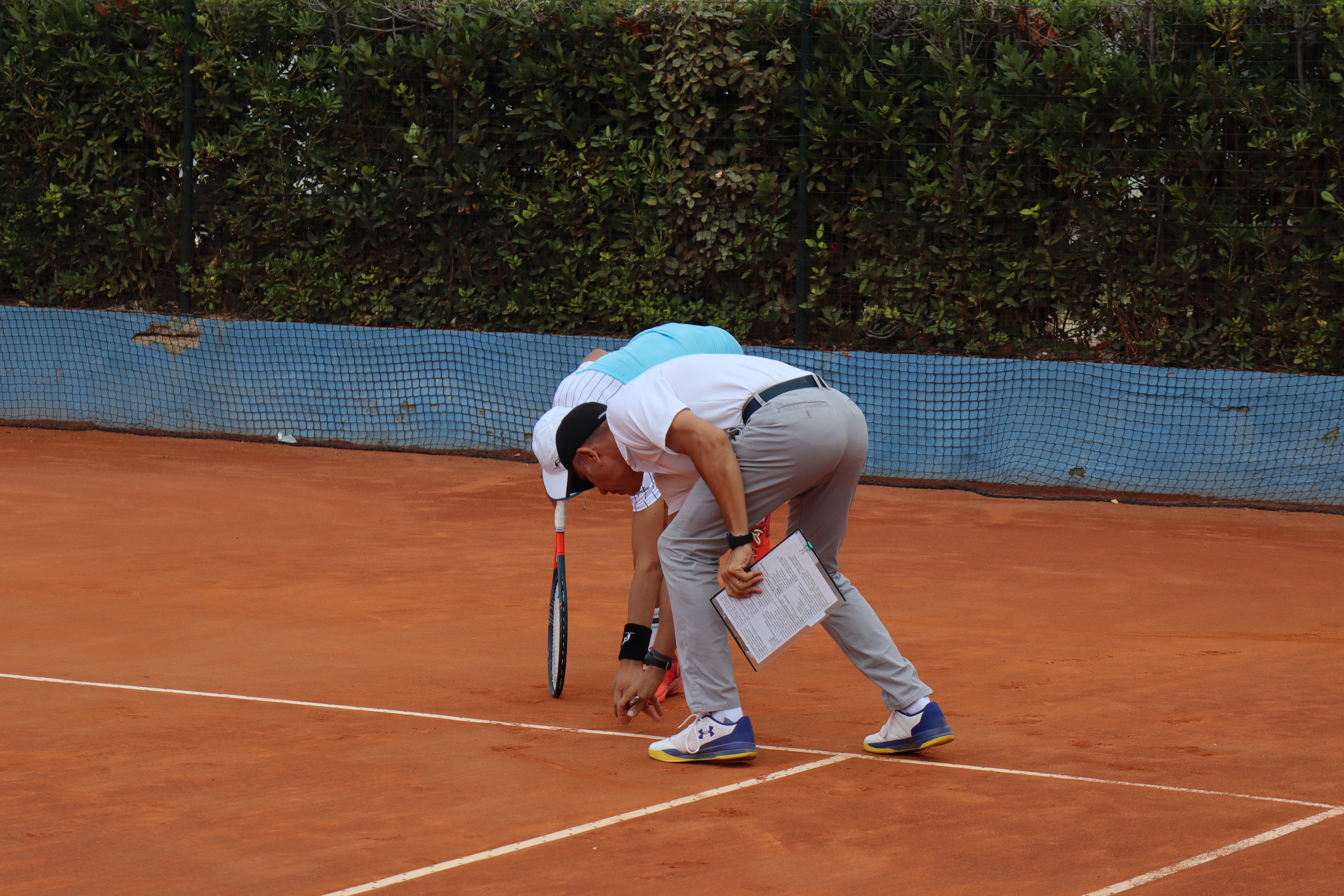 Controllo del segno della palla di un arbitro di tennis